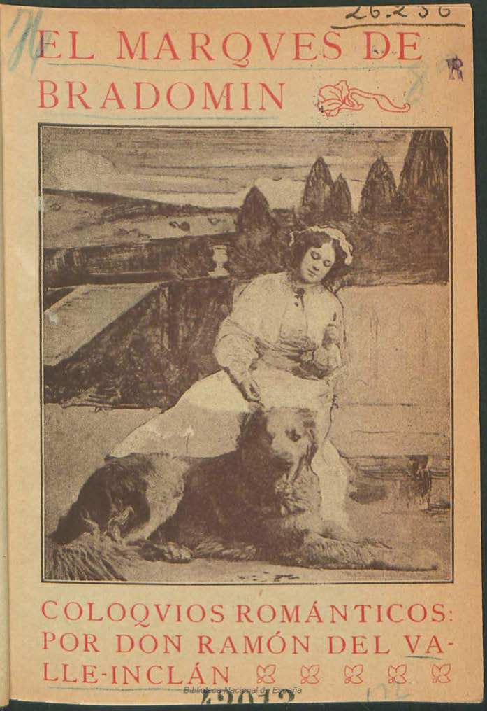 El marqués de Bradomín : coloquios románticos, por Ramón del Valle Inclán Autor: Valle-Inclán, Ramón del (1866-1936) ; Vargas Vila, José María (1860-1933) - Elogio de don Ramón María del Valle-Inclán Fecha: 1907 Datos de edición: Madrid, Pueyo